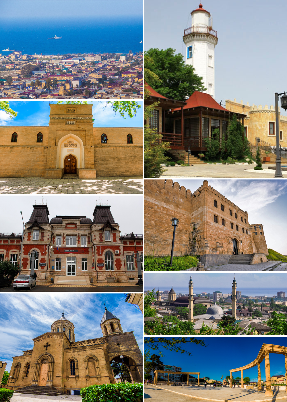 Коллаж из фотографий для статьи о Дербенте